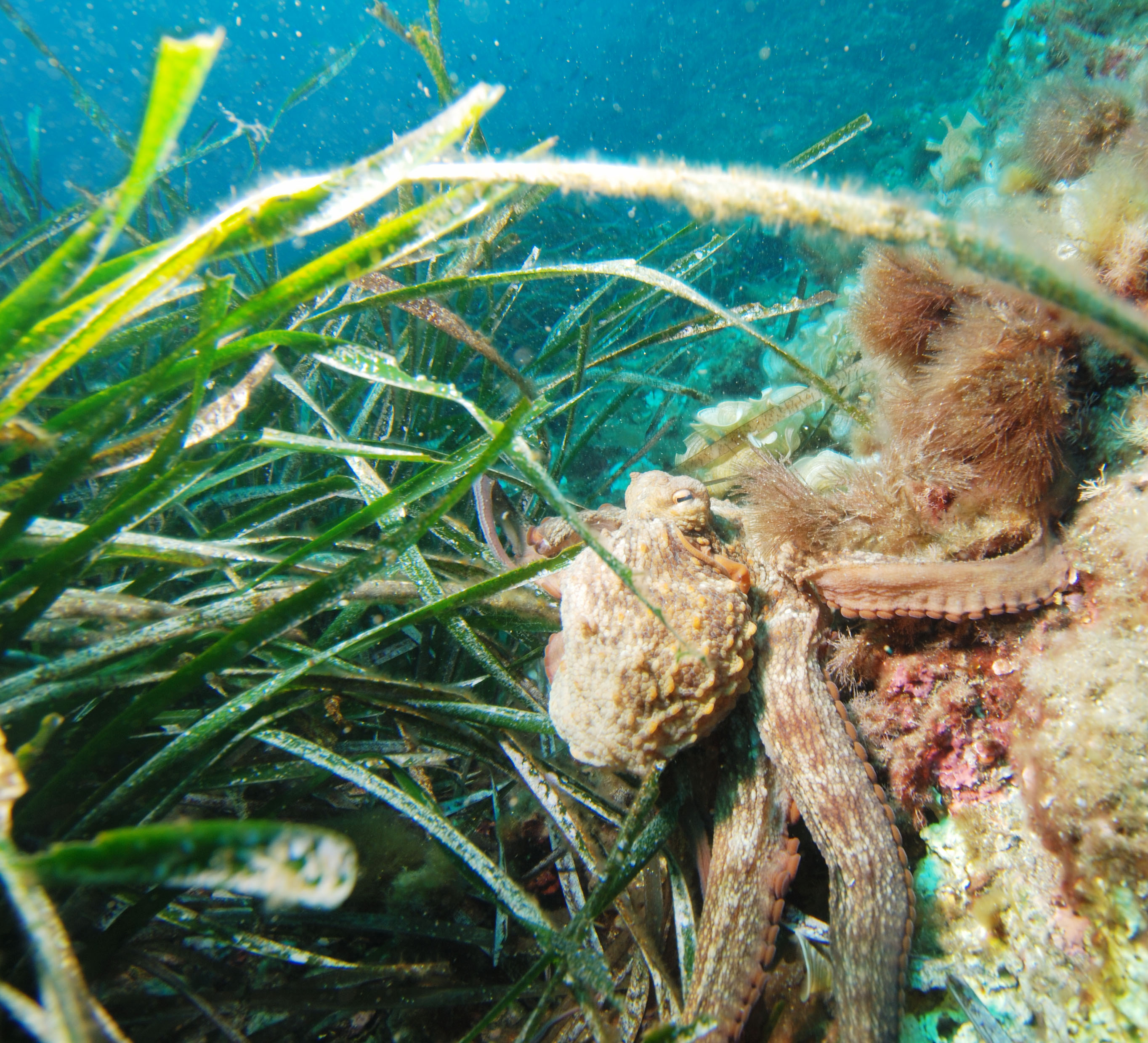 posidonia met octopus